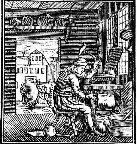 Kobberslager, tresnitt skåret av den svenske boktrykker Eric Kiellberg, Stockholm i 1753. Kiellberg har speilvent et forbilde fra et tysk kobbestikk fra 1698.